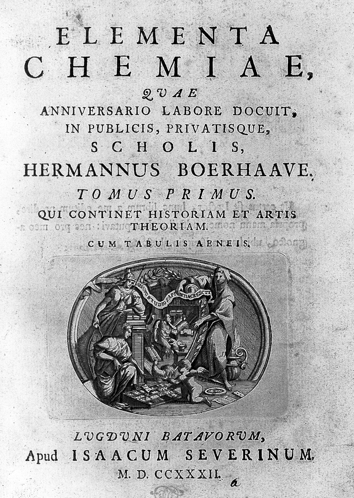 Title page Rare Books Keywords: Hermann Boerhaave